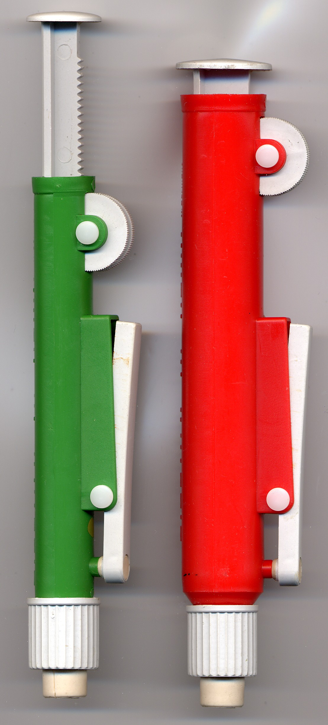 Pipettierhilfen